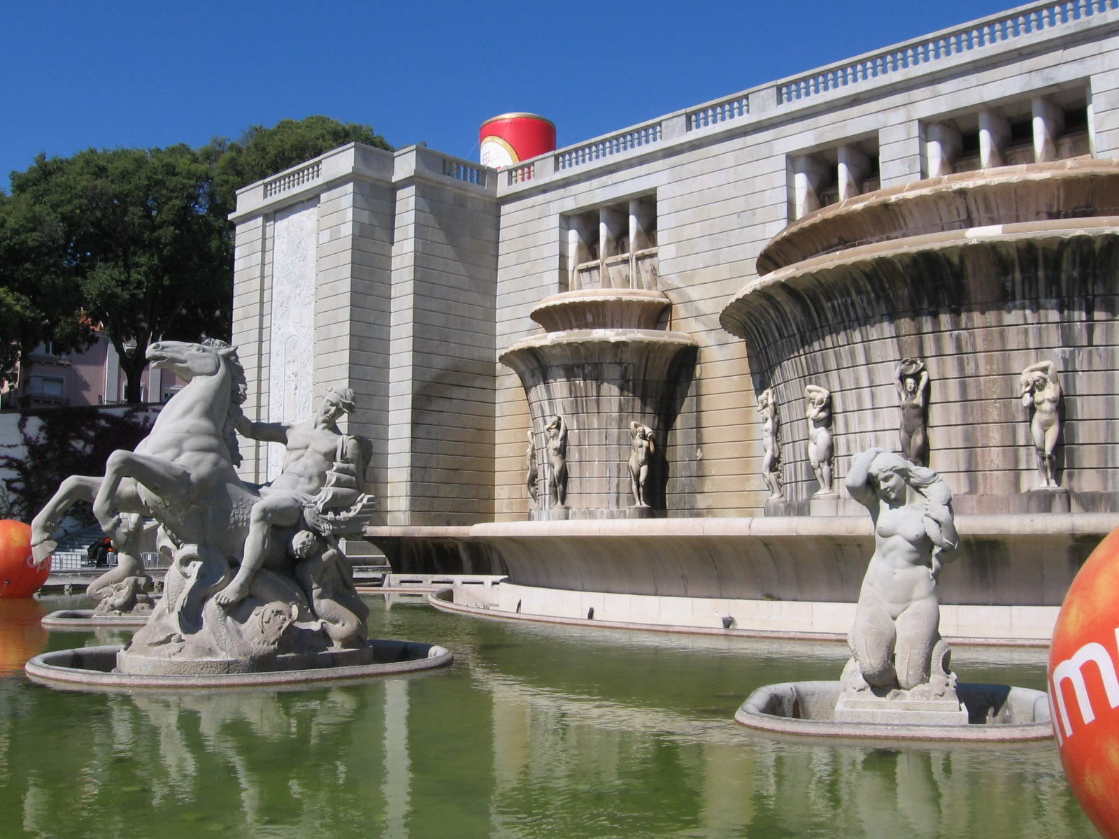 Fonte Luminosa, Alameda, Alto do Pina, Lisboa, Portugal; sculptures by Diogo de Macedo